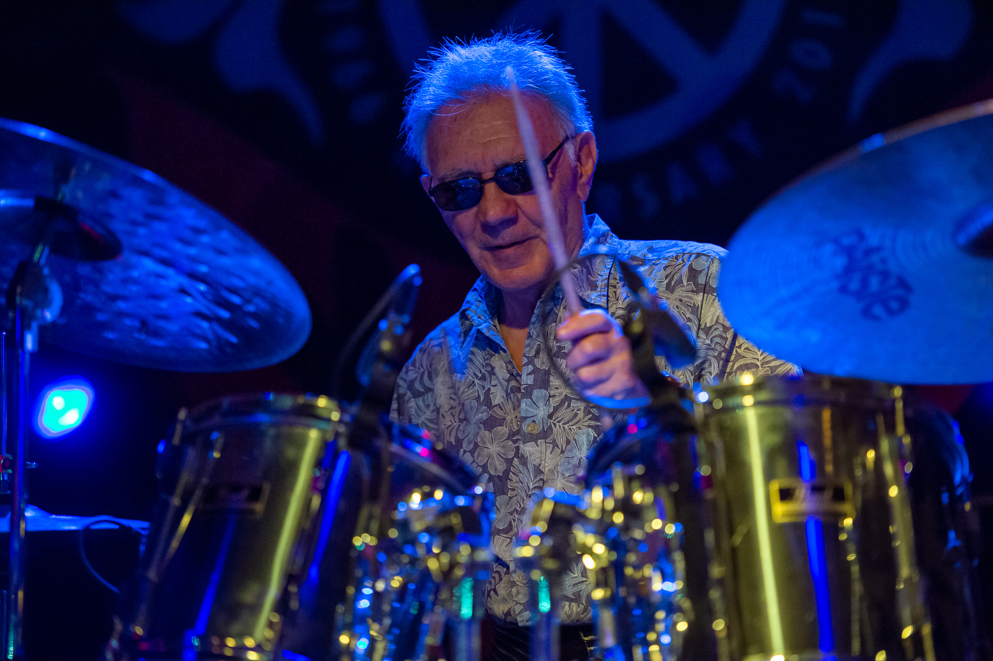 Adolfo „Fito“ de la Parra,Canned Heat,Concertbüro Franken,Konzert,Livekonzert,Livemusik,Musik,Serenadenhof